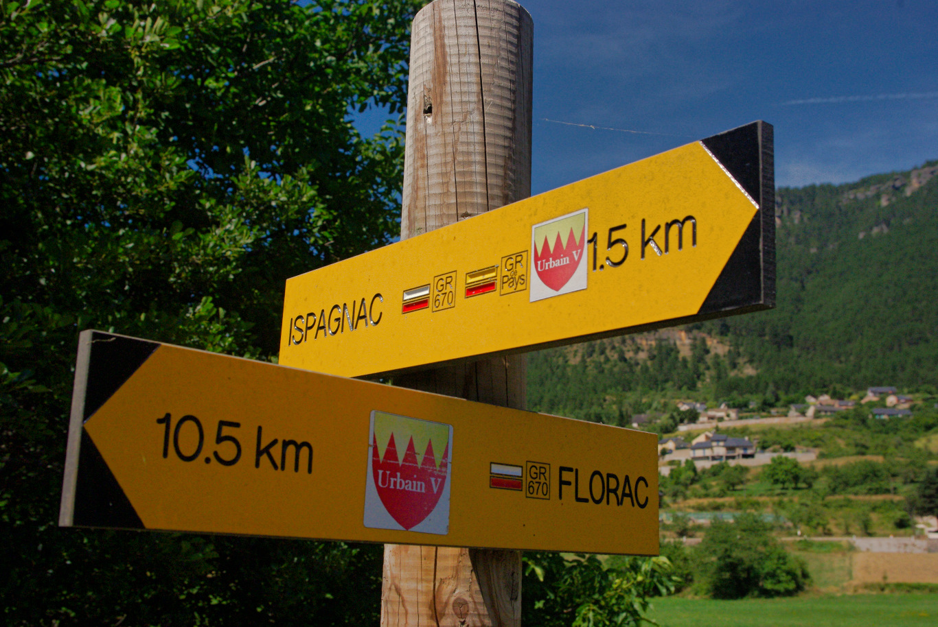 Au pont de Quézac (Lozère), illustration du balisage du chemin Urbain V